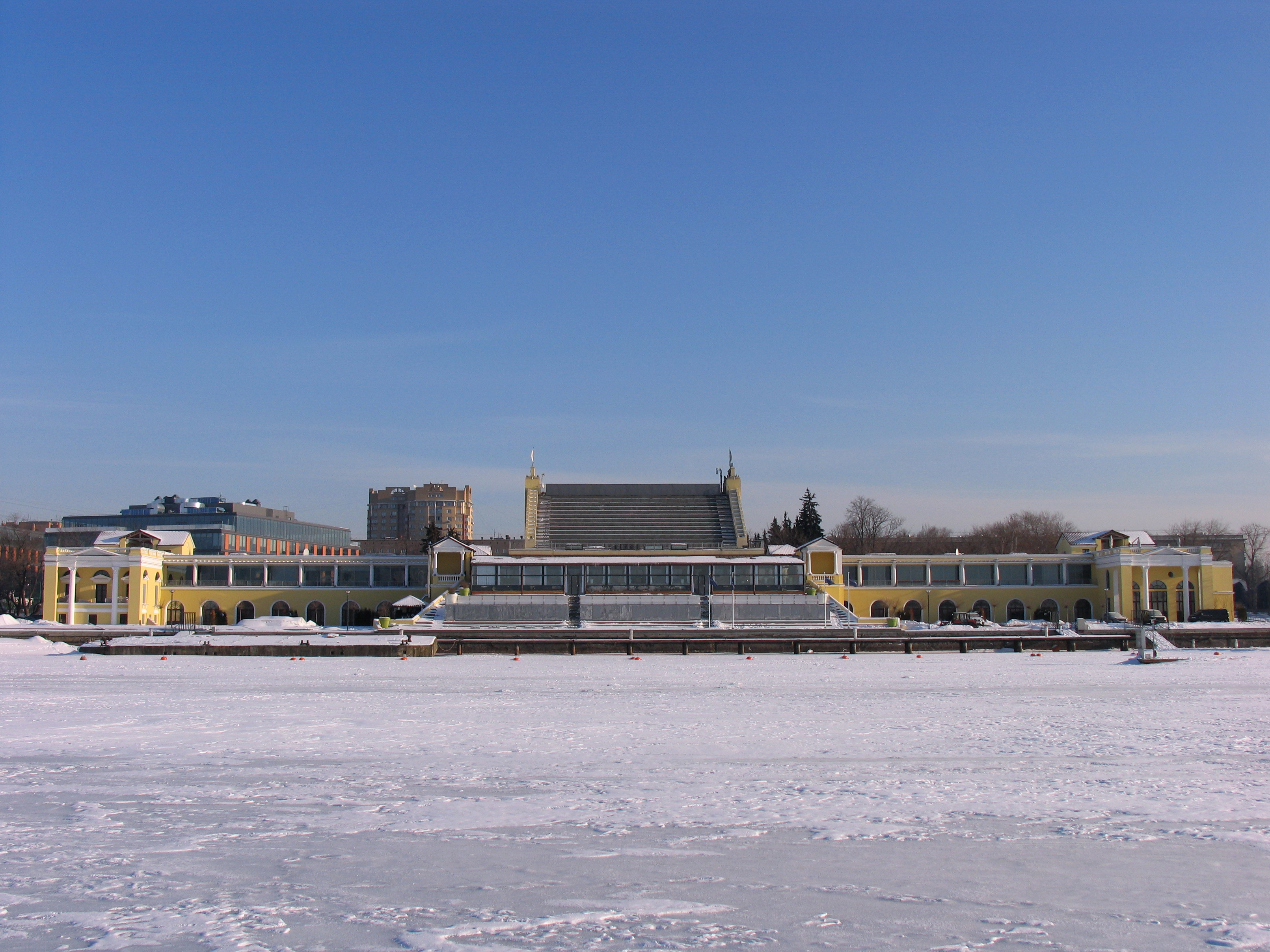 Водный стадион зимой.